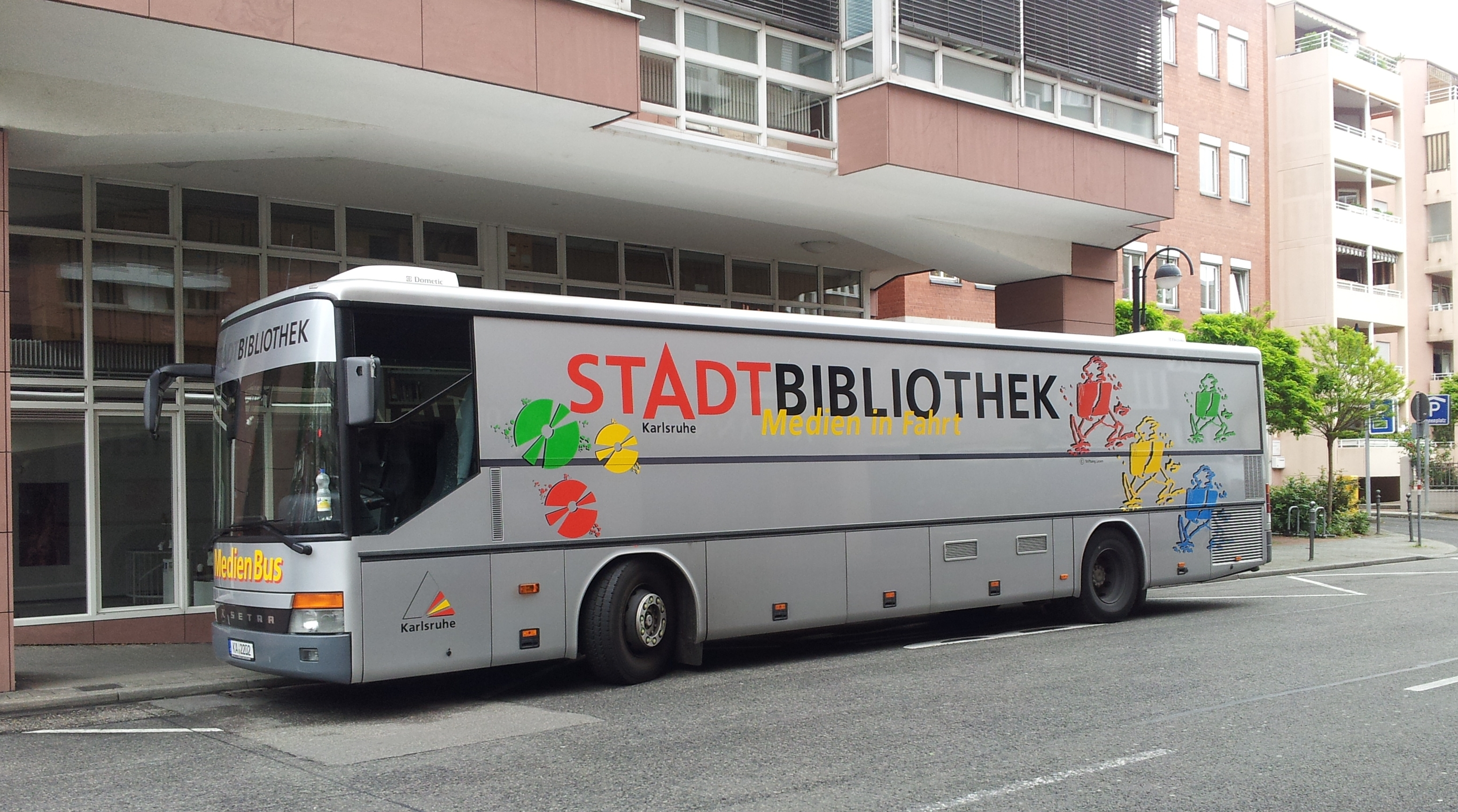 Bücherbus Karlsruhe, Mai 2014